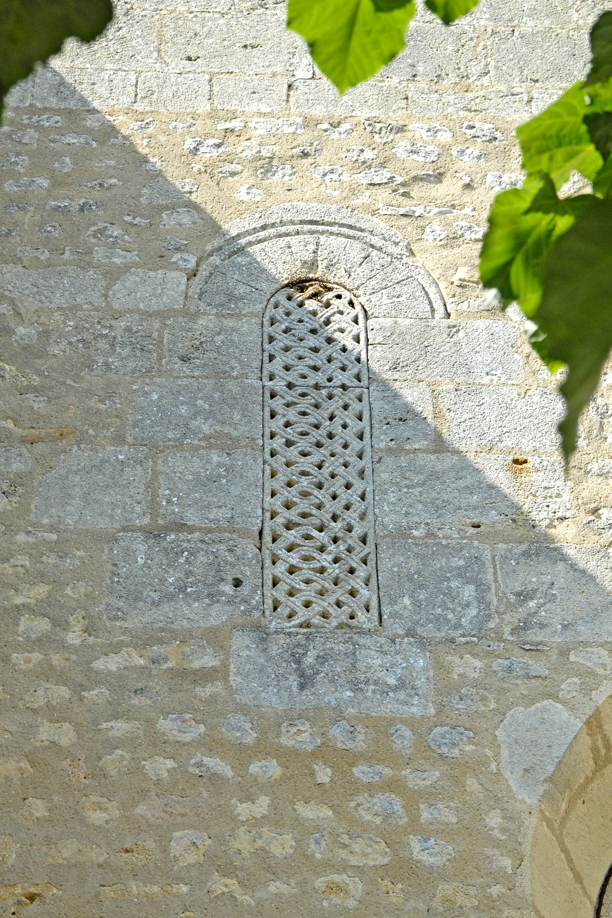 Fenioux, karolingisches Fenster